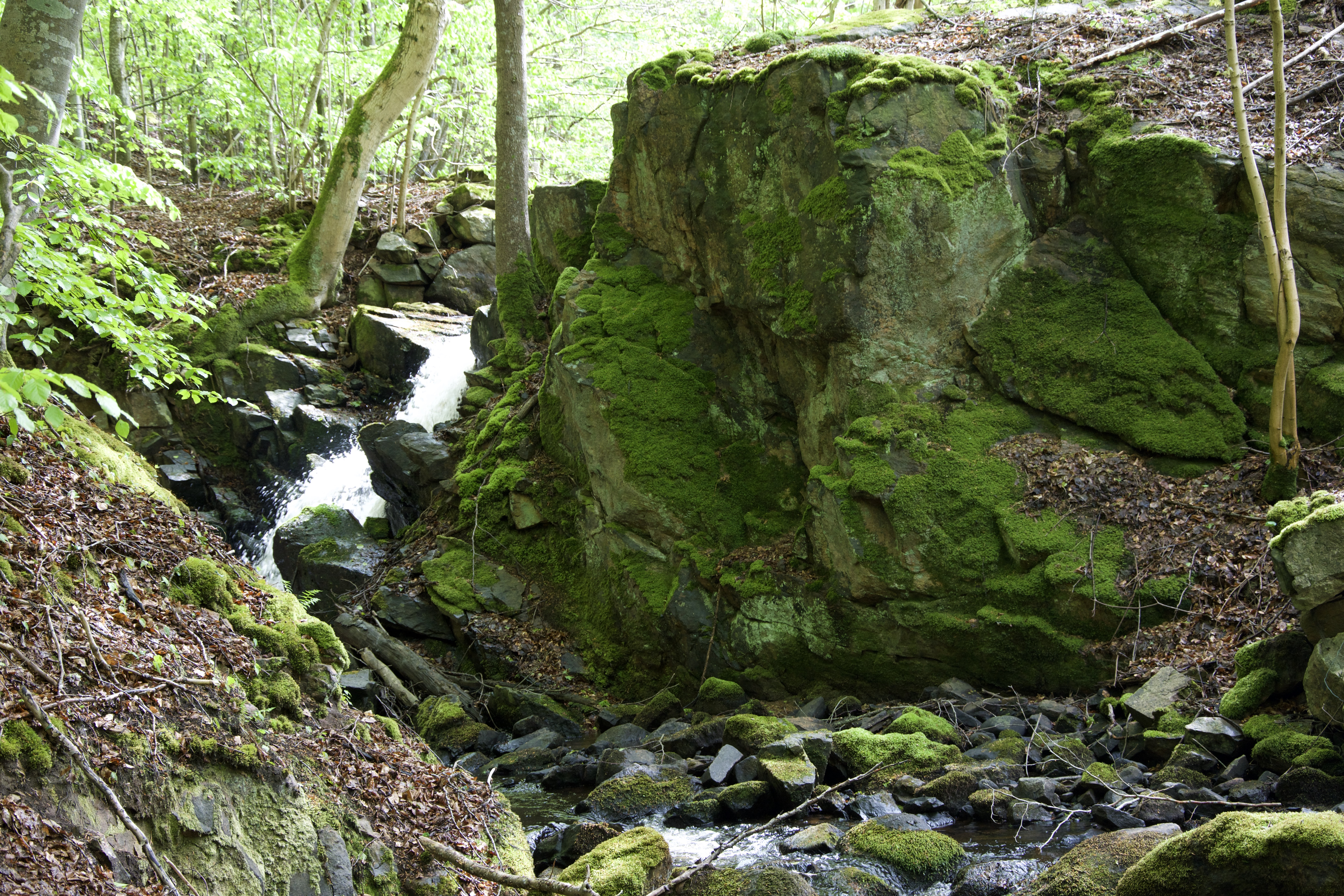 Vatenfall från höjden av ravinen i Axelstorps skogar